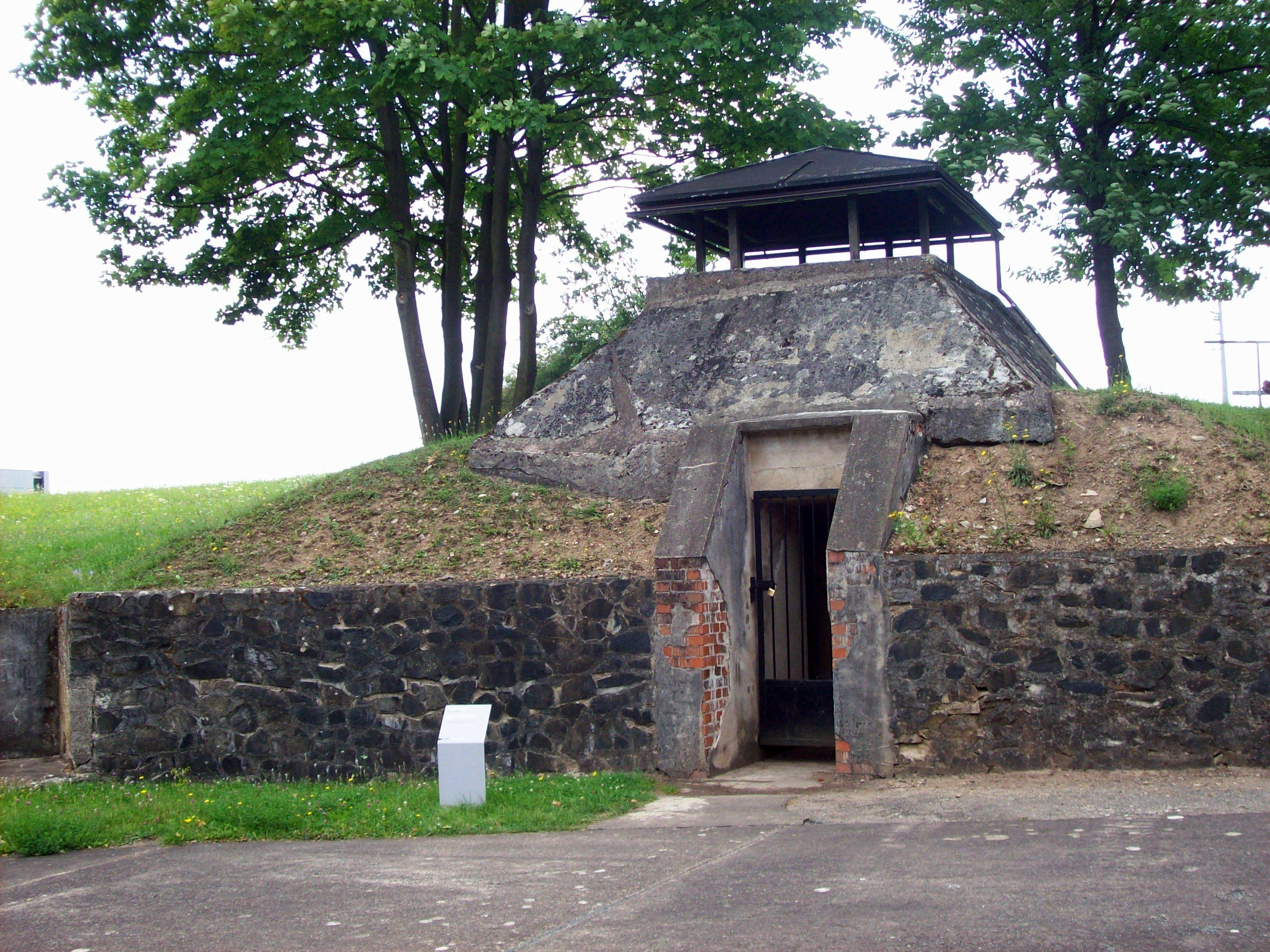 Ein Stehbunker oder SS-Unterstand am Eingangsbereich vom Konzentrationslager Dora